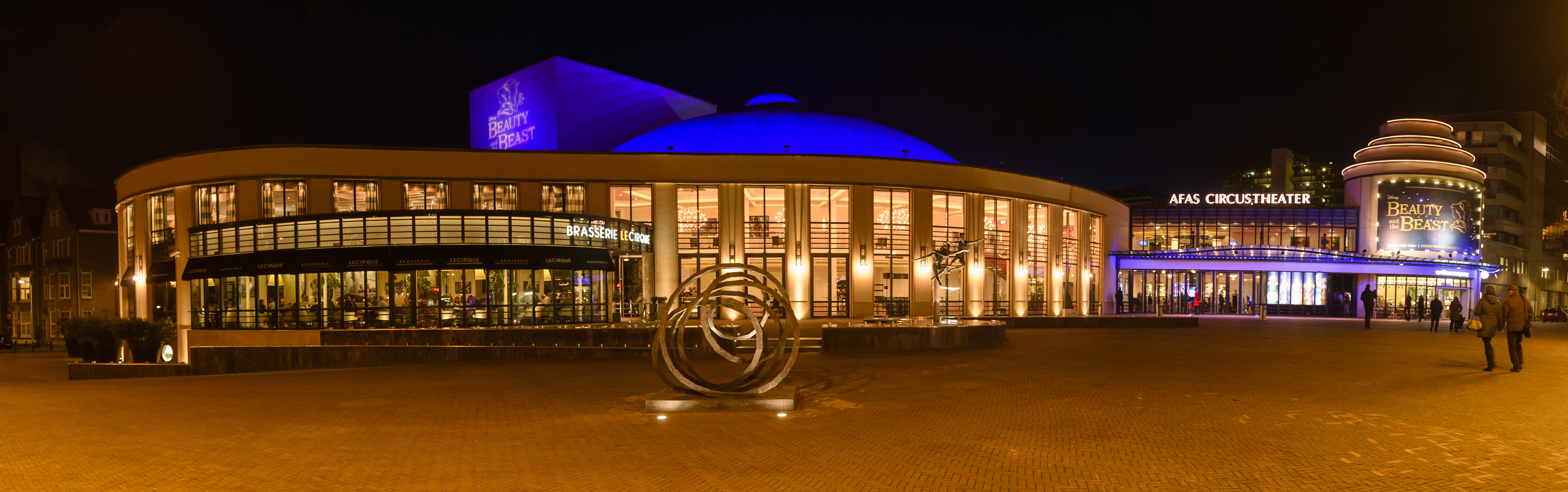 Fotocredites: Roy Beusker